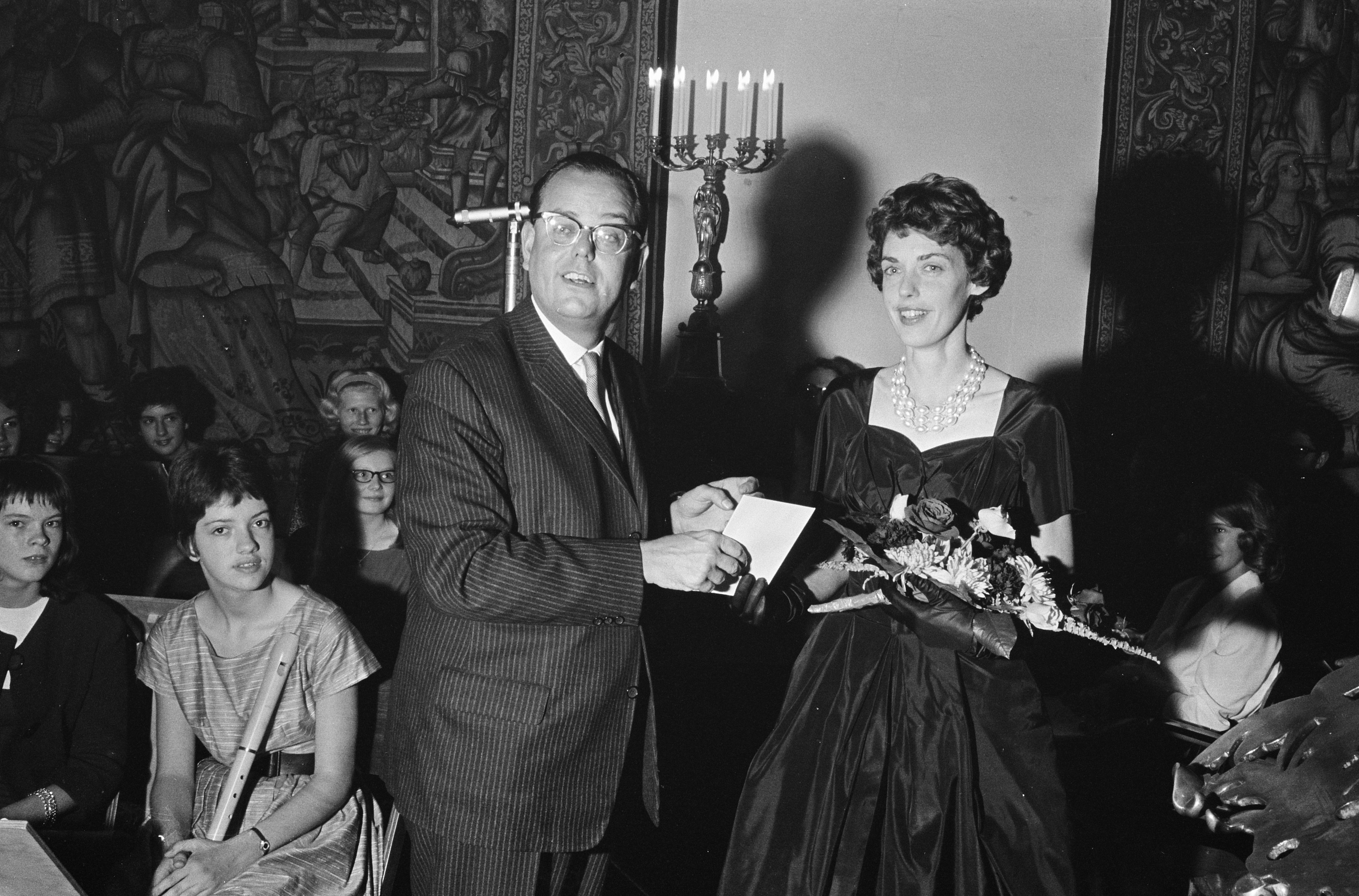 Collectie / Archief : Fotocollectie Anefo Reportage / Serie : [ onbekend ] Beschrijving : Prijs Kinderboek van het jaar 1963 door mr. L. B. van Ommen uitgereikt aan mejuffrouw Tonke Dragt voor haar boek "De brief voor de koning" Datum : 25 oktober 1963 Locatie : Delft Trefwoorden : literatuur, prijsuitreikingen, schrijvers Persoonsnaam : Dragt, Tonke Fotograaf : Walta, Winfried / Anefo Auteursrechthebbende : Nationaal Archief Materiaalsoort : Negatief (zwart/wit) Nummer archiefinventaris : bekijk toegang 2.24.01.05 Bestanddeelnummer : 915-6820